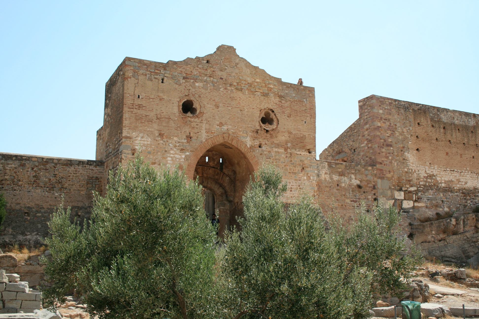 Castillo de Sagunto (Valencia)